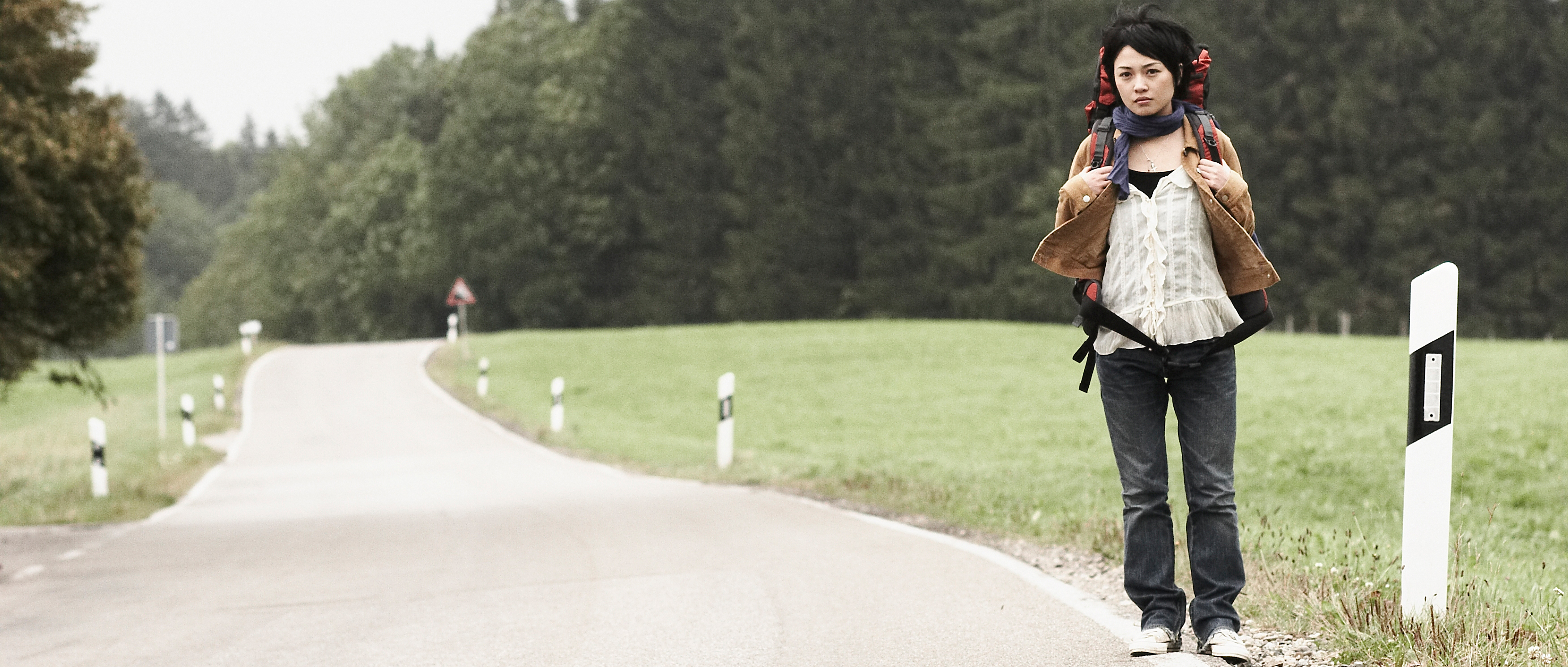 Standphoto "Der Rote Punkt"